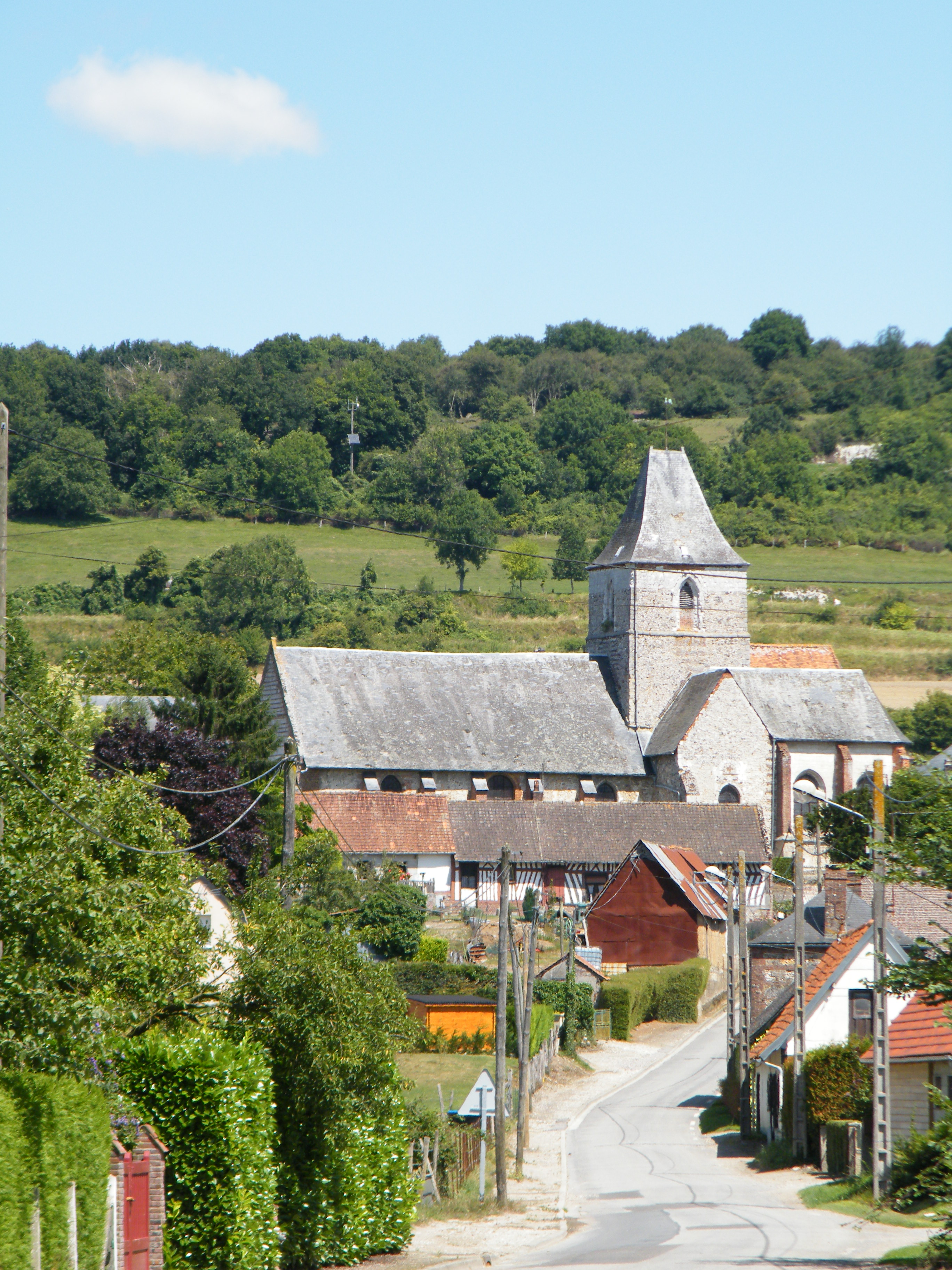 Douvrend, Seine-Maritime, France, église